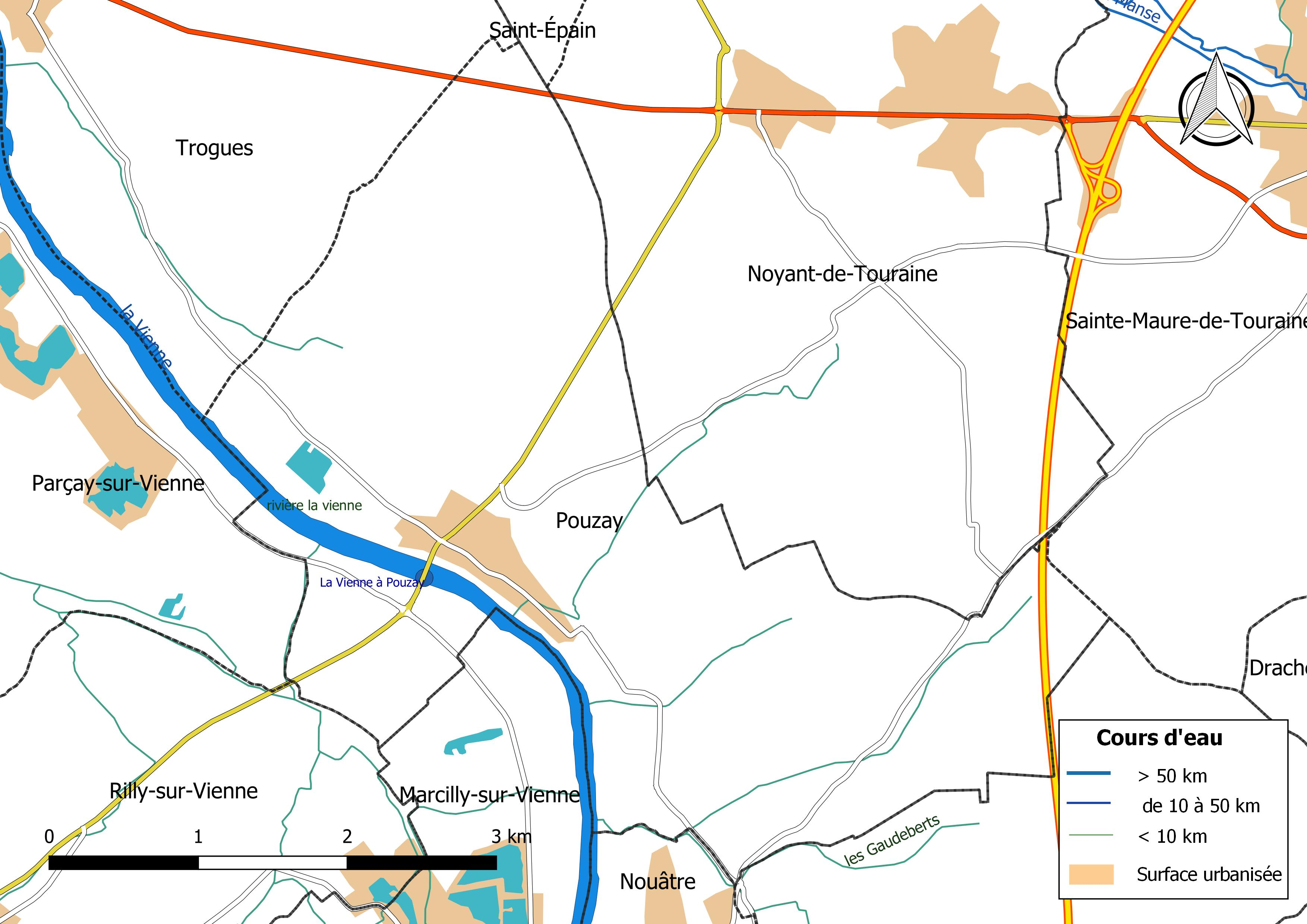 Carte du réseau hydrographique de la commune de Pouzay (France).